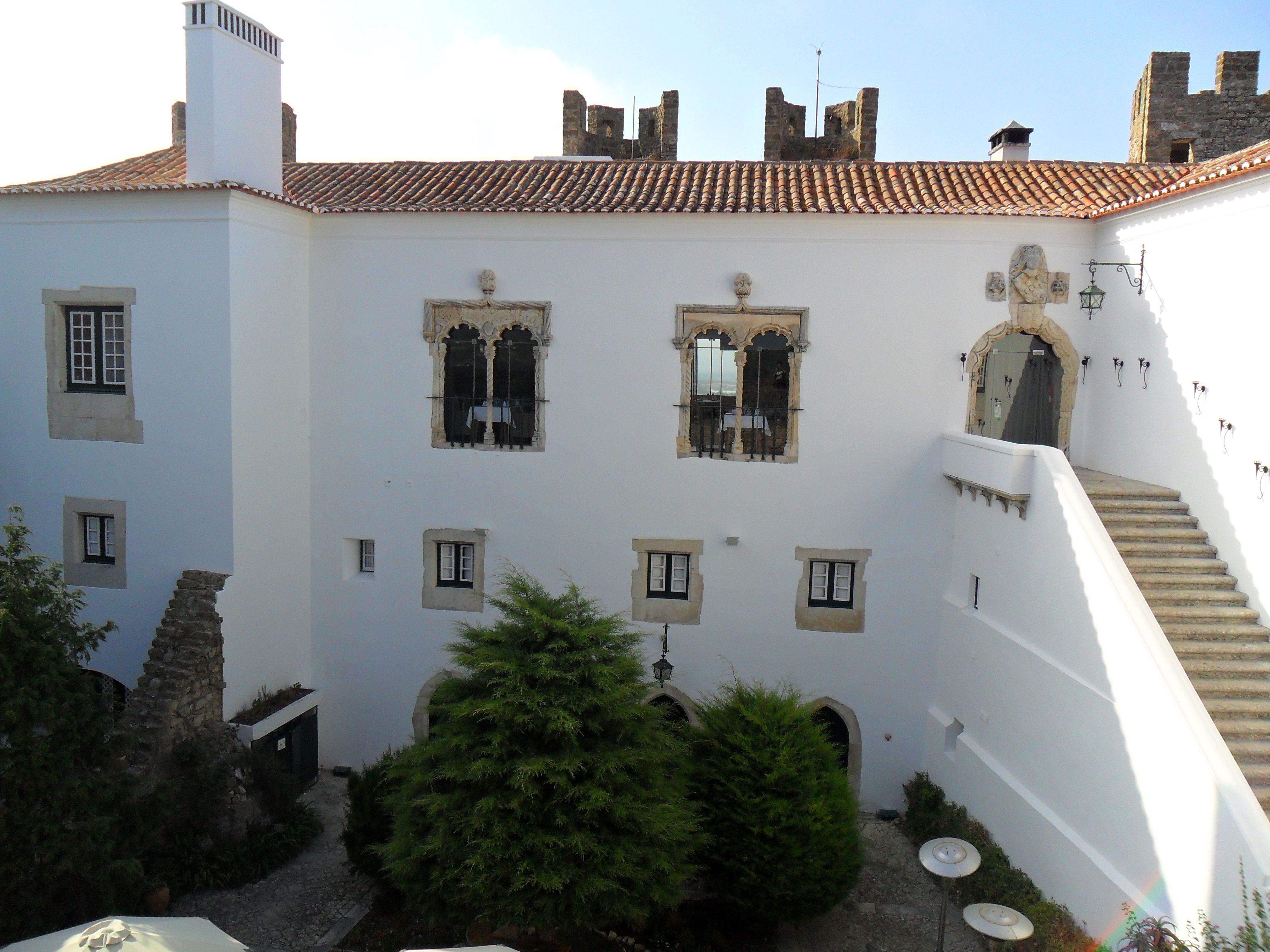 interior This file was uploaded for Wiki Loves Monuments in Portugal with the unique identifier 70427.